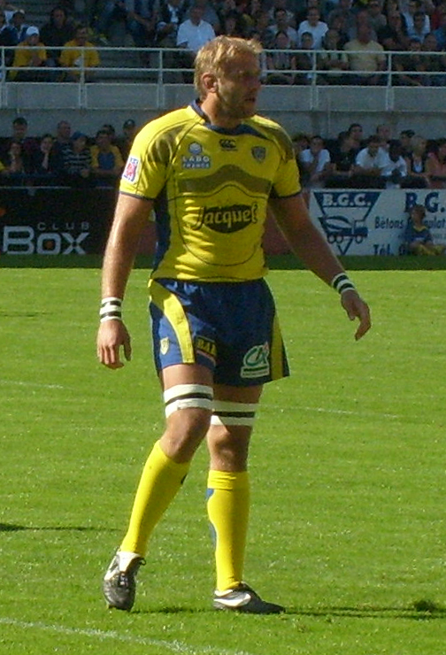 Thibaut Privat affronte l'Aviron Bayonnais dans les rangs de l'ASM Clermont Auvergne au stade Marcel Michelin de Clermont-Ferrand.